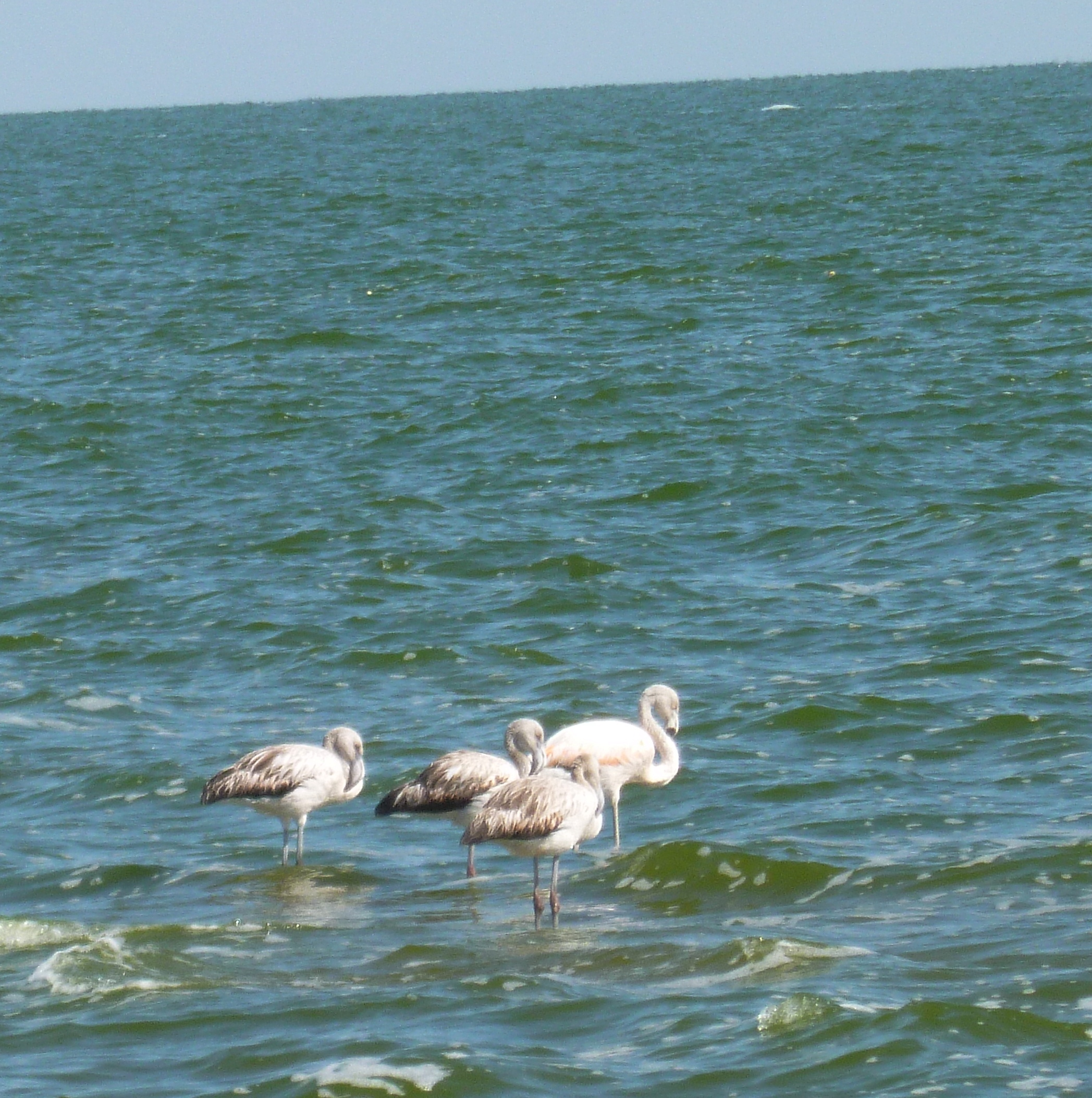 Flamencos Jovenes en los Bañados del Rio Dulce y Laguna Mar Chiquita(Reserva Provincial de Cordoba-Argentina_Declarada sitio Ramsar